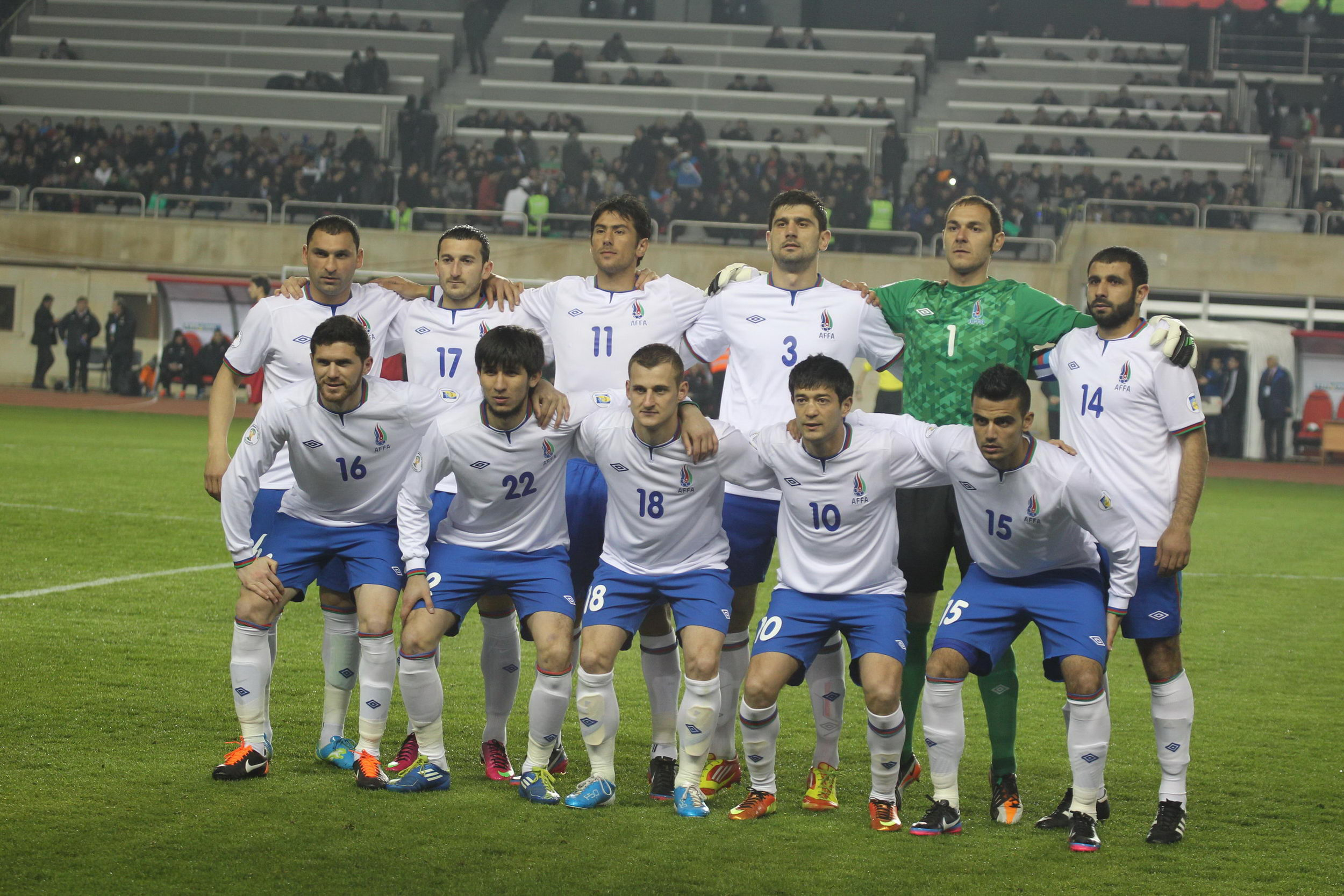 Azərbaycan milli futbol komandası